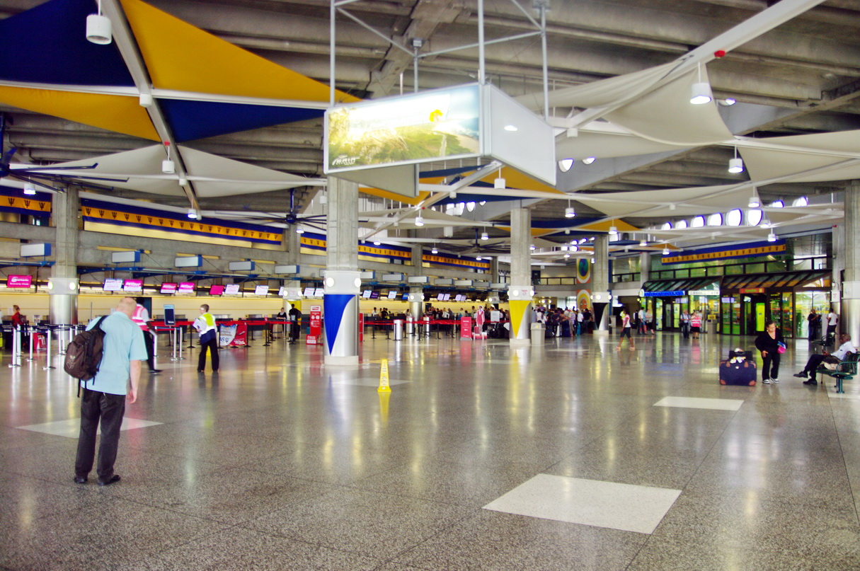 Abflughalle Grantley Adams International Airport, Barbados